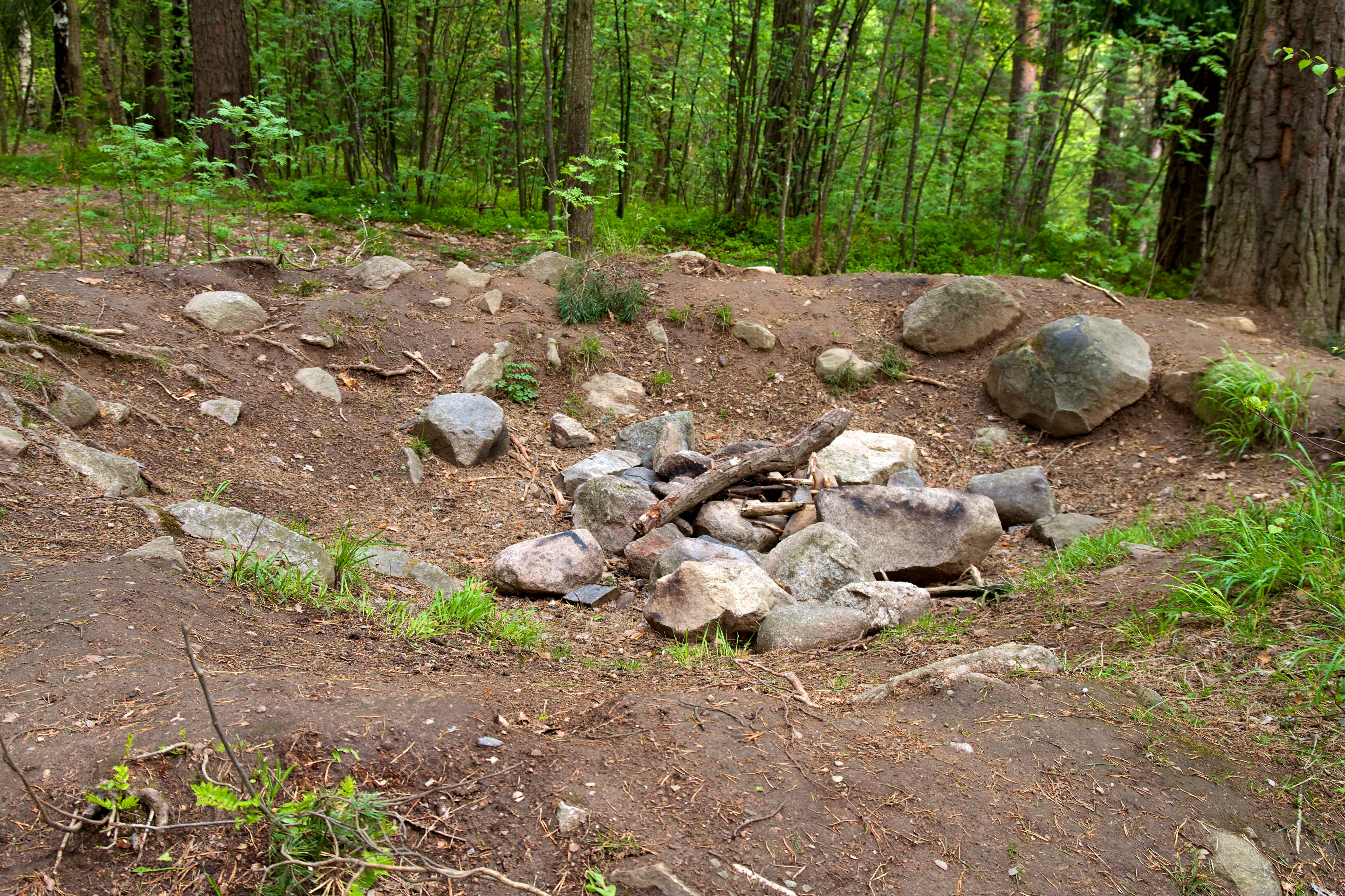 Gravplass fra jernalderen. Tallberget i Bydel Østensjø i Oslo.